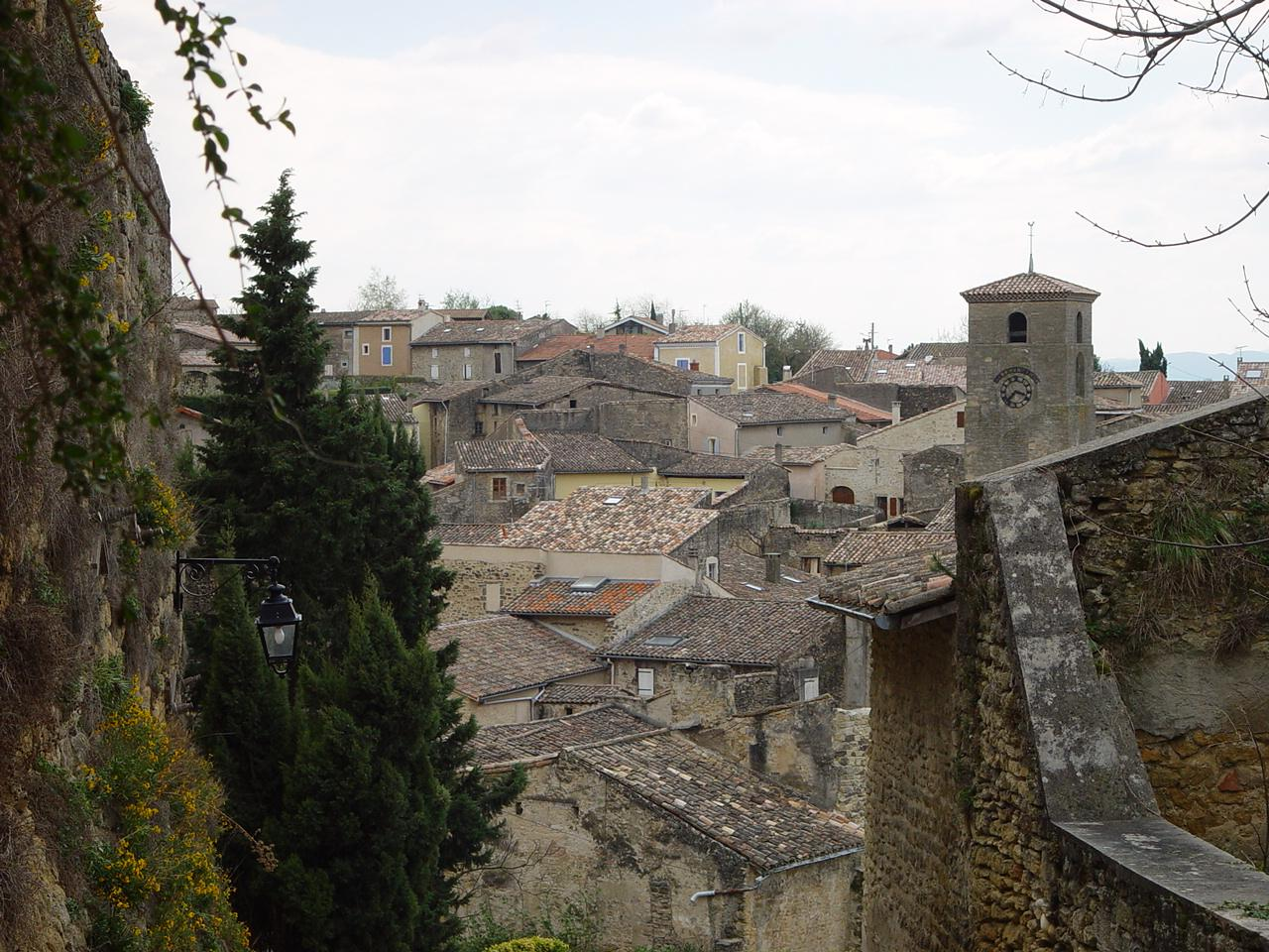 Étoile-sur-Rhône (Drôme / France)